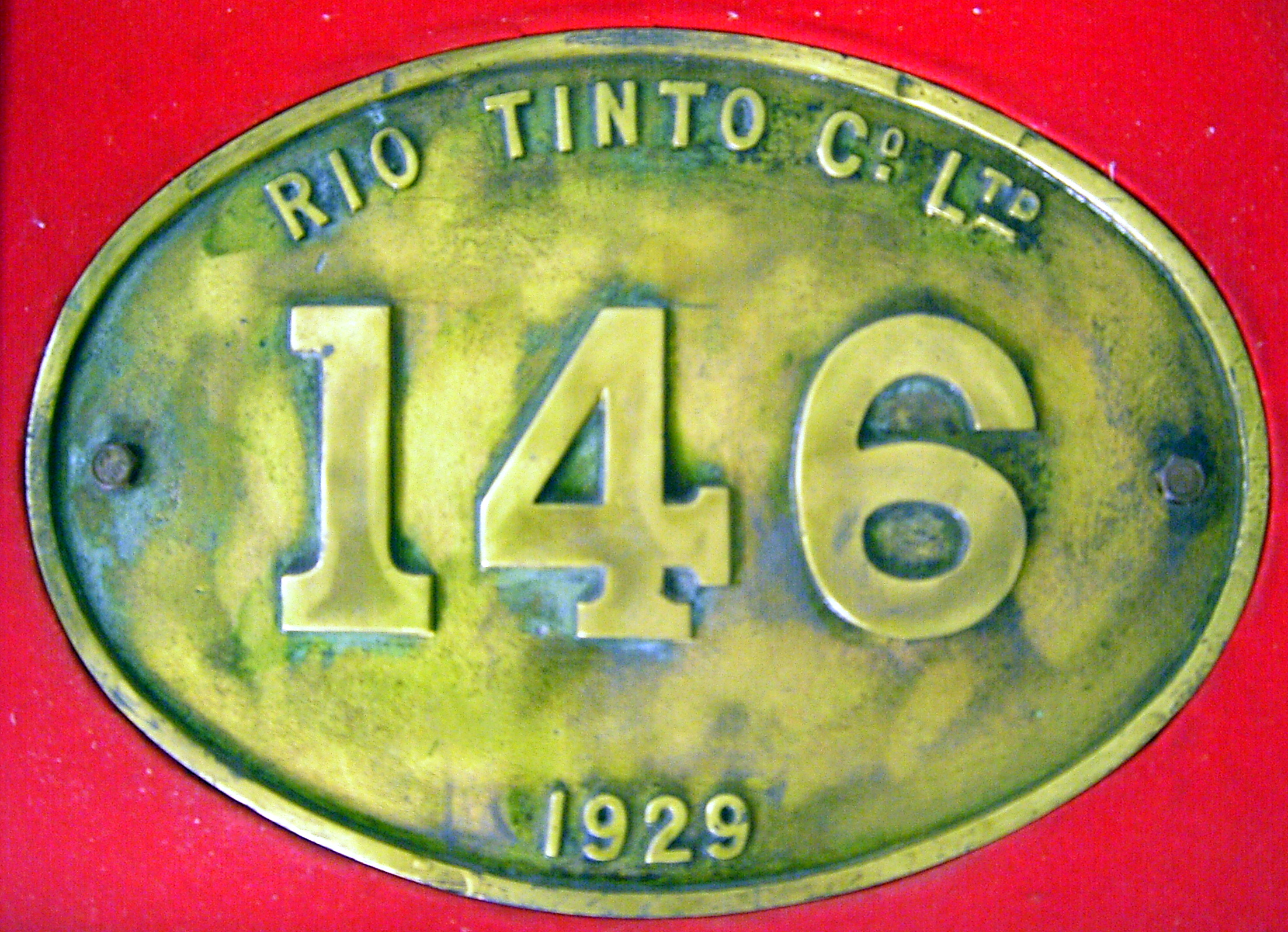 Placa tren minero de Riotinto (Huelva)